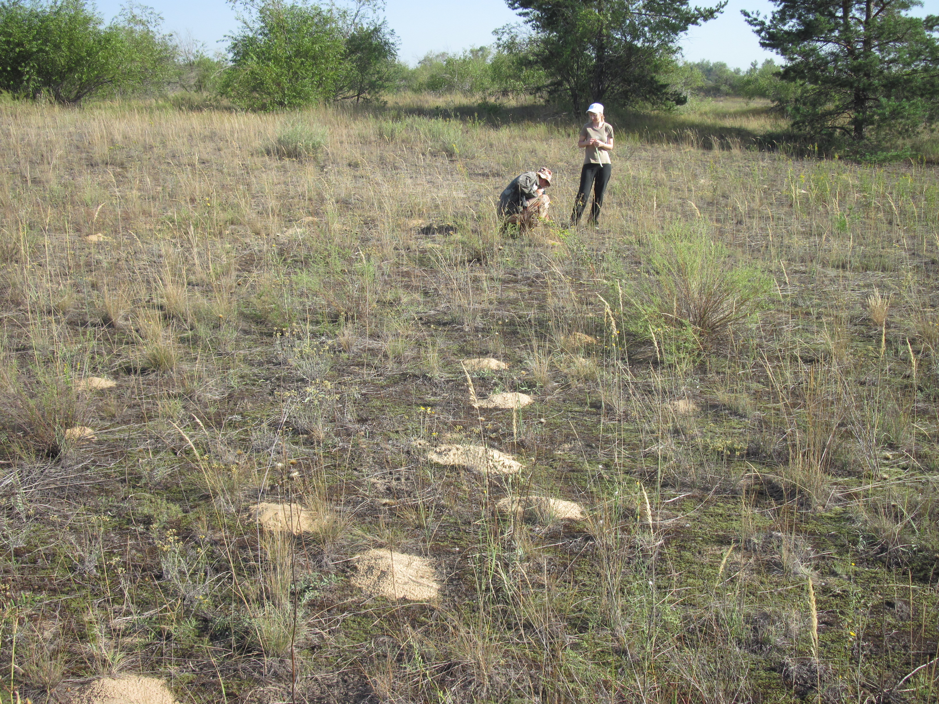 Дослідження колоній сліпушка (Трьохізбенський степ, 2010 р.). Фото колонії з дослідниками